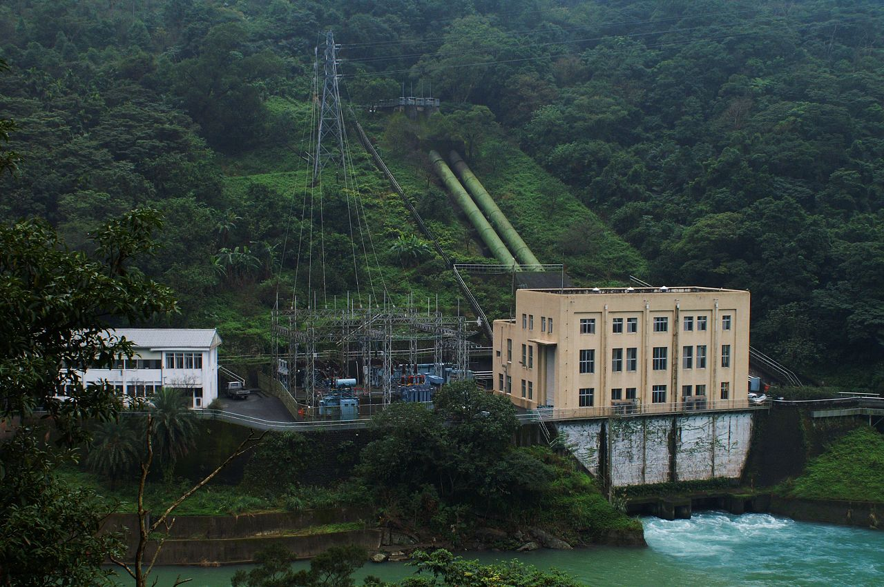 桂山電廠 Guei Shan Power Plant of Fei Cuei Reservoir